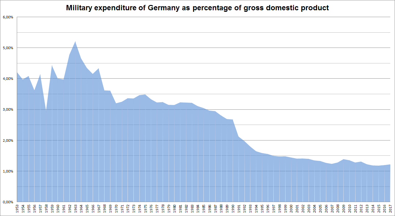 Verteidigungsetat Deutschlands nach Anteil am BIP